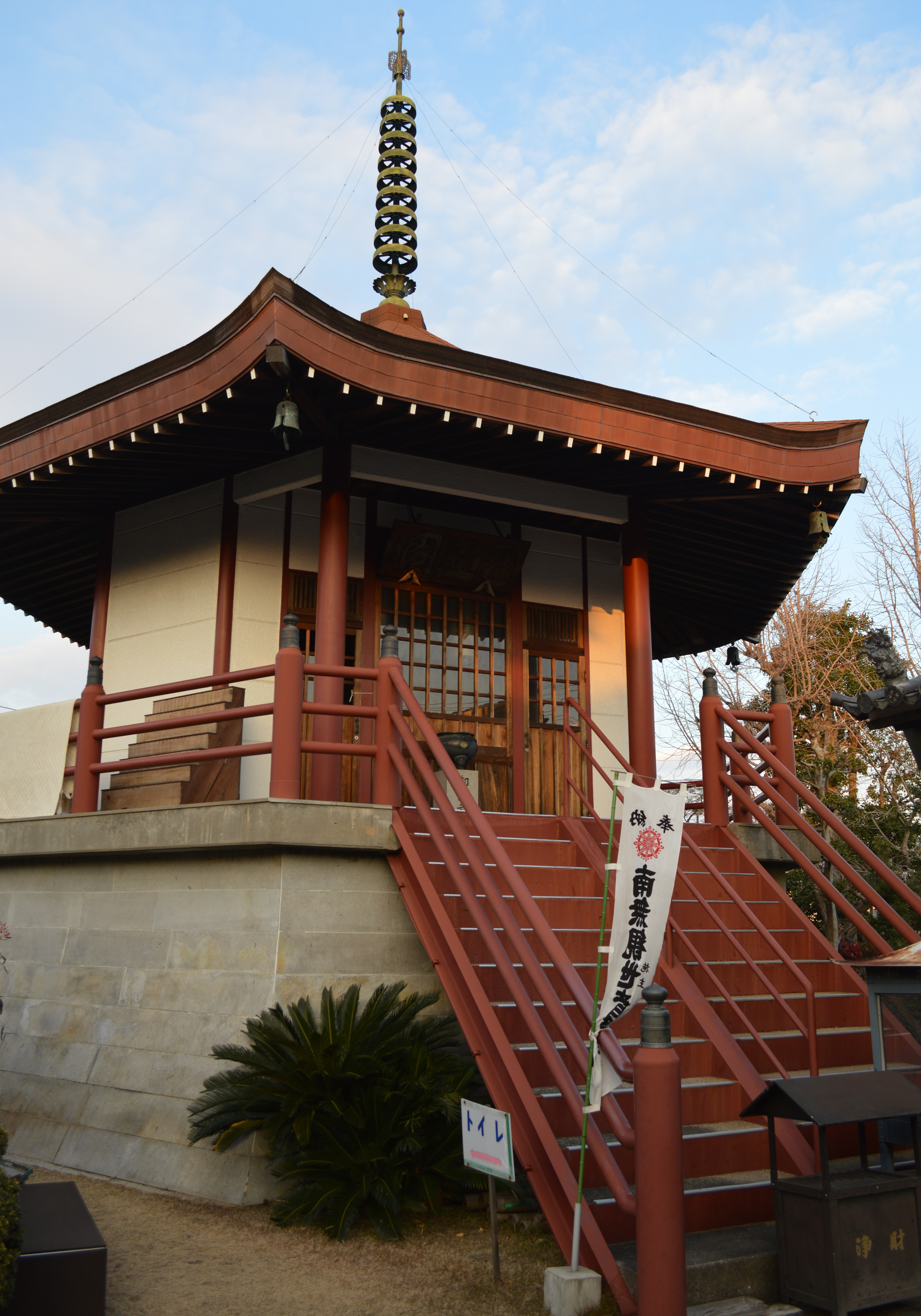 愛知県刈谷市|刈谷市一ツ木町にある曹洞宗の寺院「西福寺」